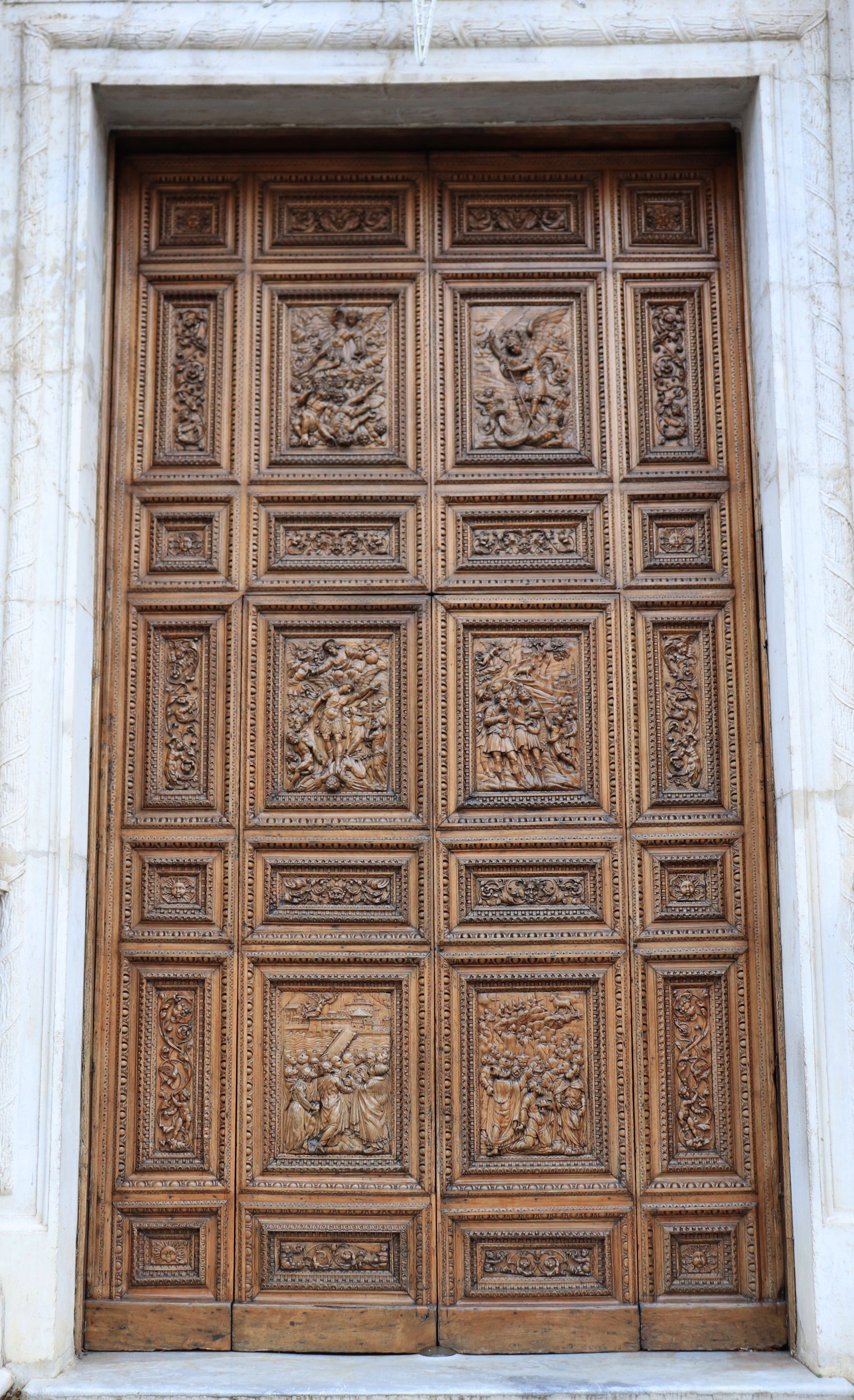 Porta principale della collegiata di San Michele Arcangelo in Solofra (AV).